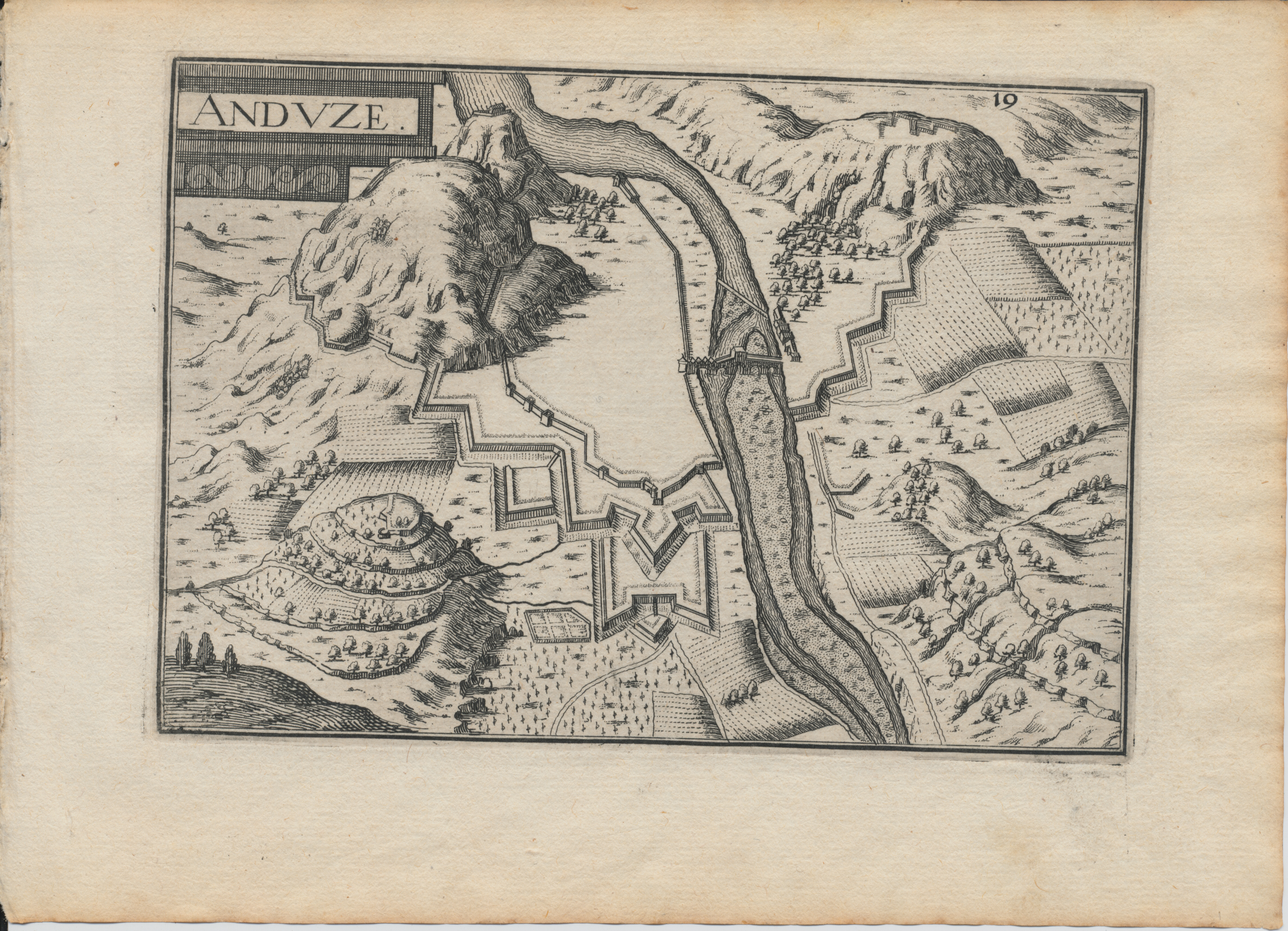 Gravure extraite de "Les Plans et Profils de toutes les principales villes et lieux considérables de France. par le Sieur TASSIN, géographe ordinaire de sa Majesté. A paris, Chez Melchior Tavernier, en l'Isle du Palais. 1634